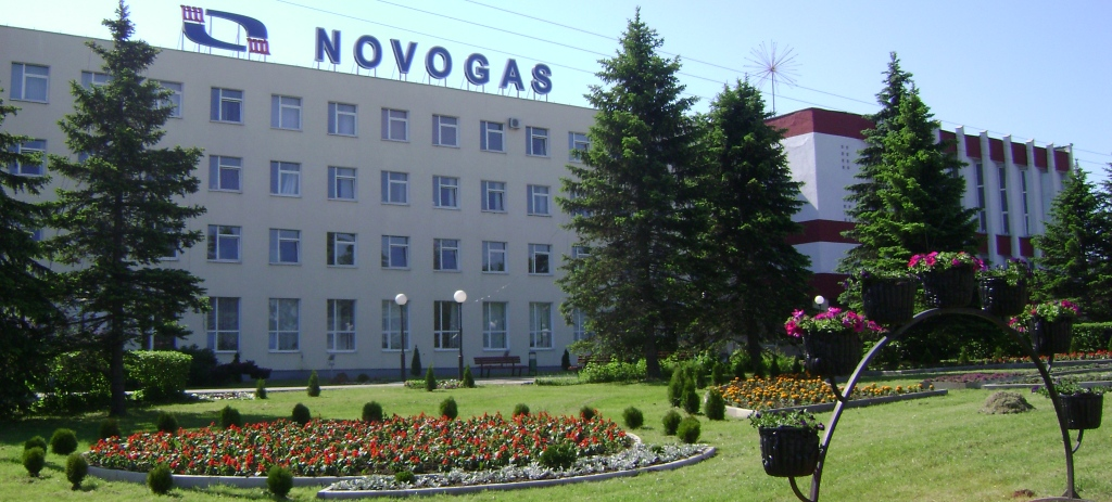 NOVOGAS